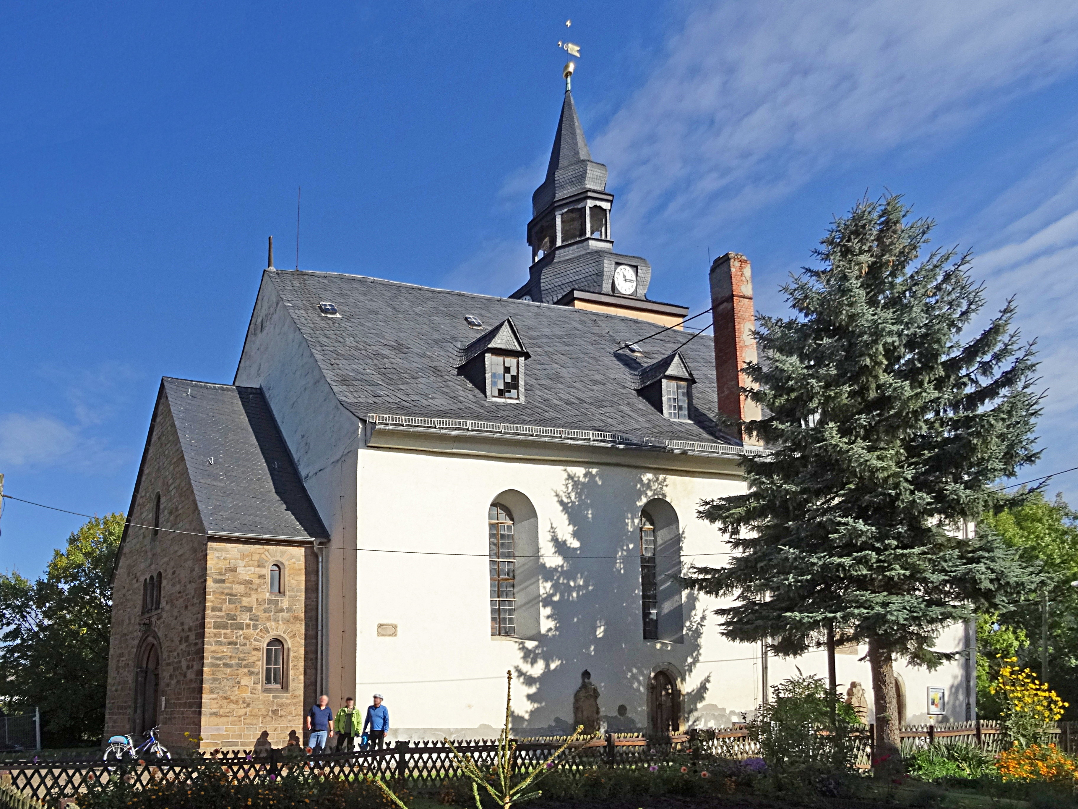 Großmonra St. Peter & Paul, Ansicht von Süden